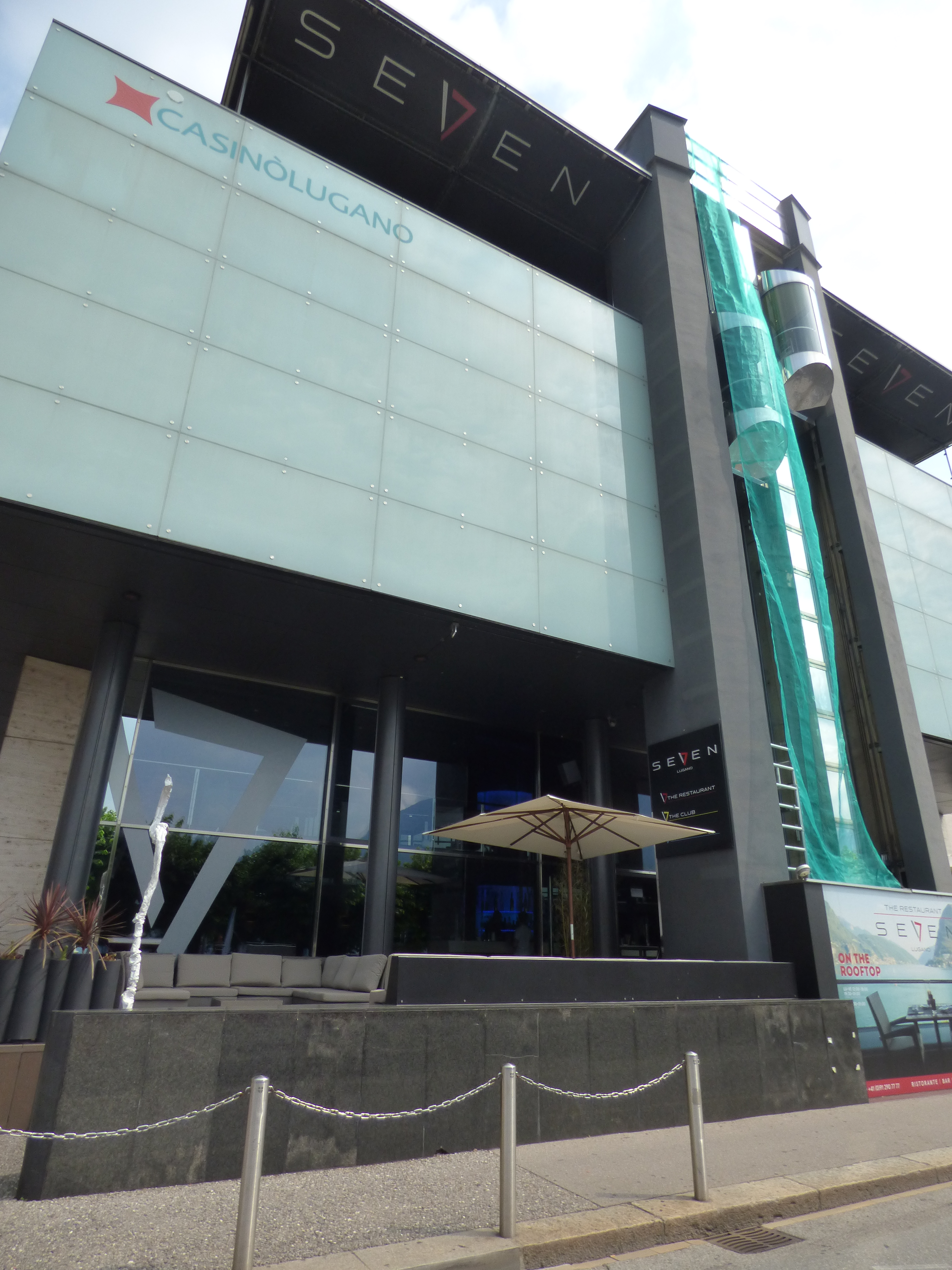 Casino Lugano